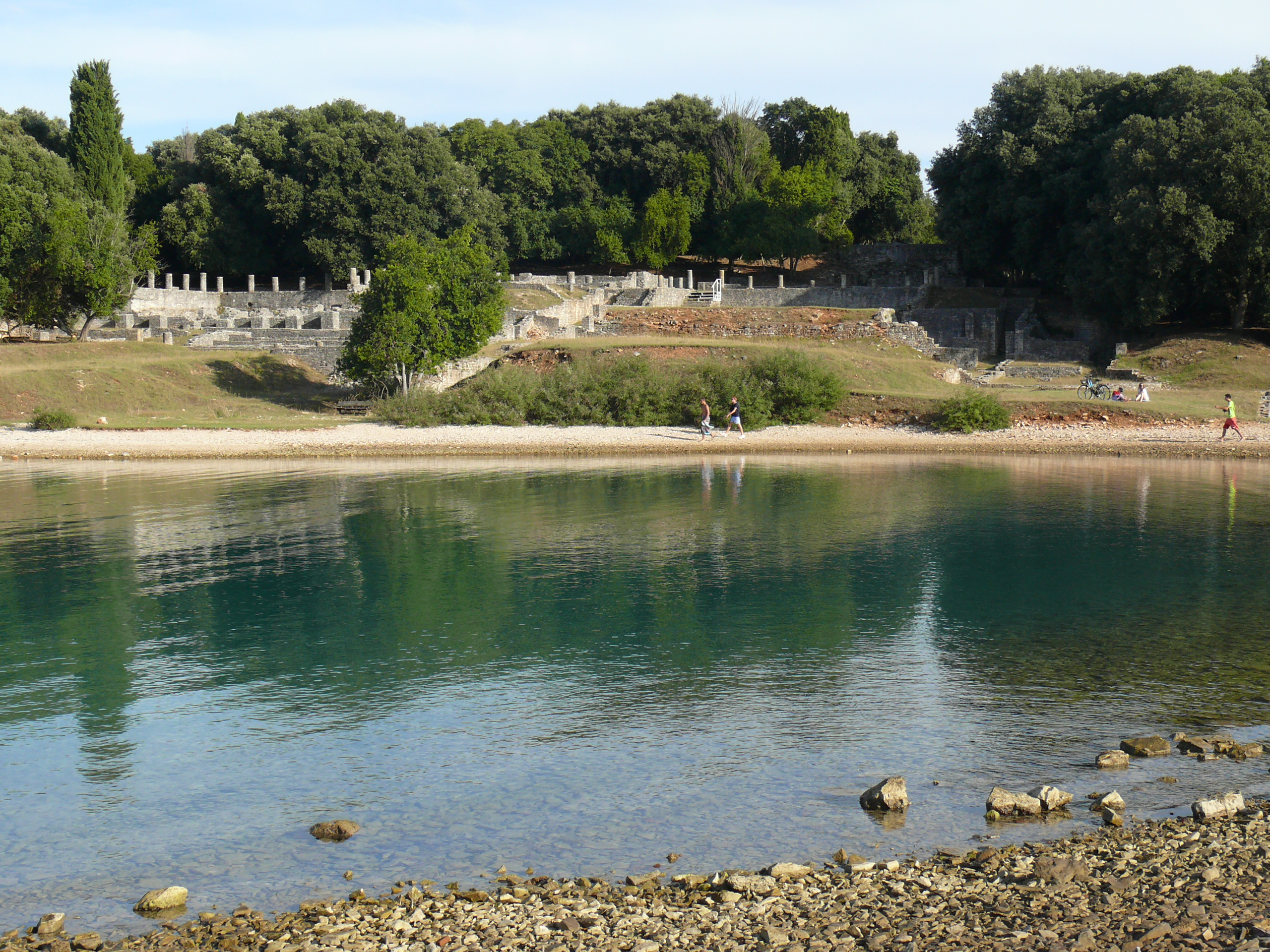 Photos d'Italie et de Croatie Vestiges d'une villa romaine sur l'île de Brijuni.